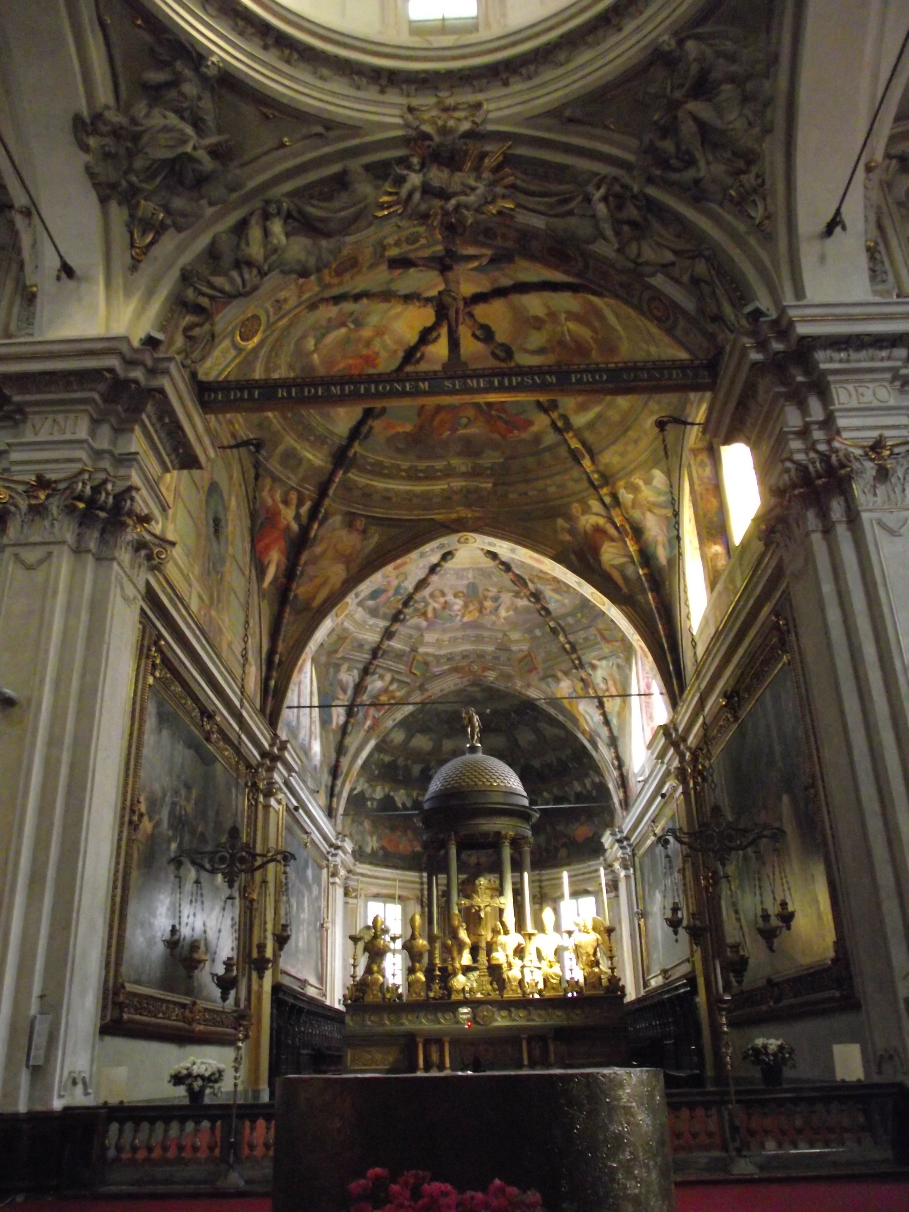 Presbiterio